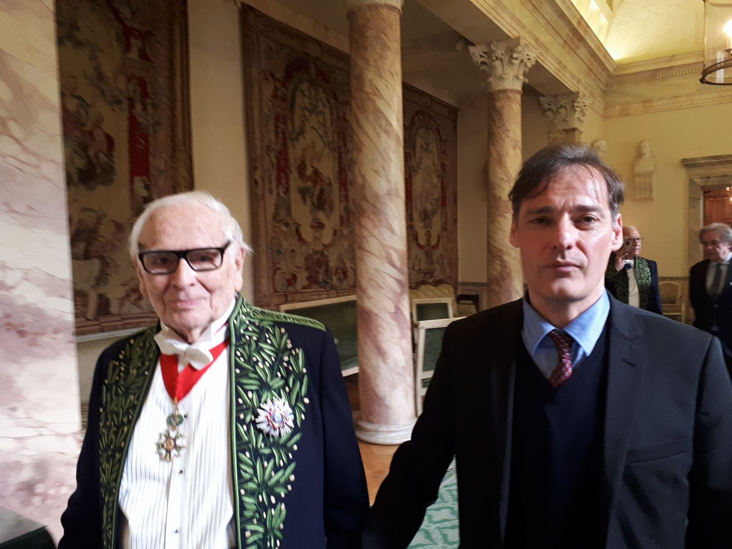 PIerre Cardin and the French composer Régis Campo